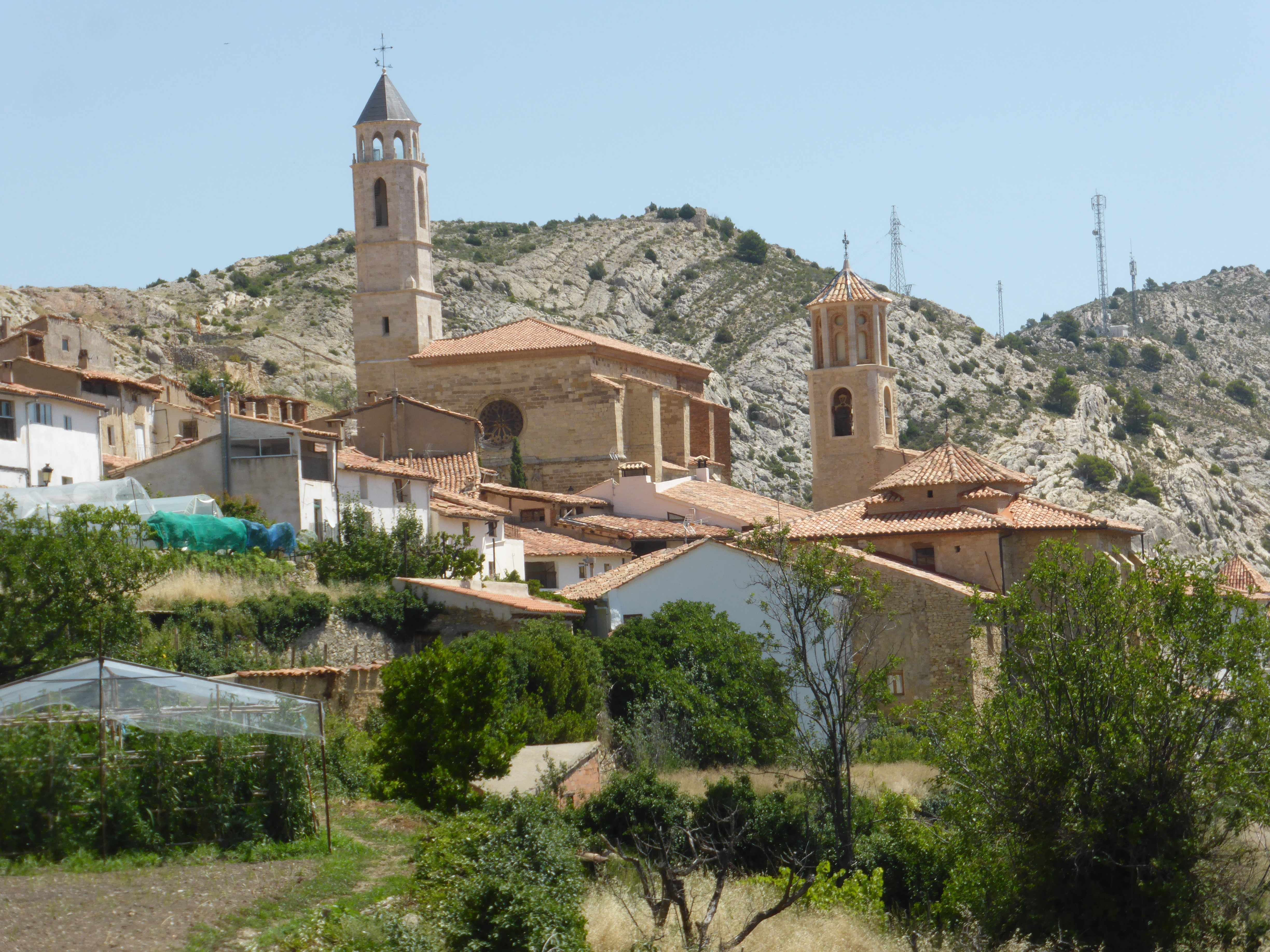 A la izquierda, la iglesia de San Miguel, gótica, del siglo XV. Su torre ha sido reconstruida en 2017, pues fue dañada en la Guerra Civil. A la derecha, la iglesia o ermita de la Virgen del Agua, del siglo XVII.